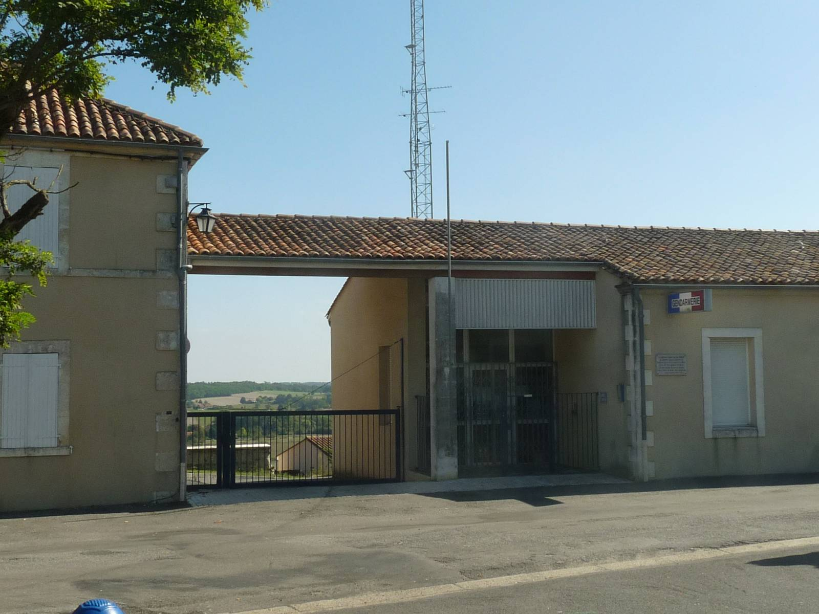 gendarmerie de Brossac (16), France